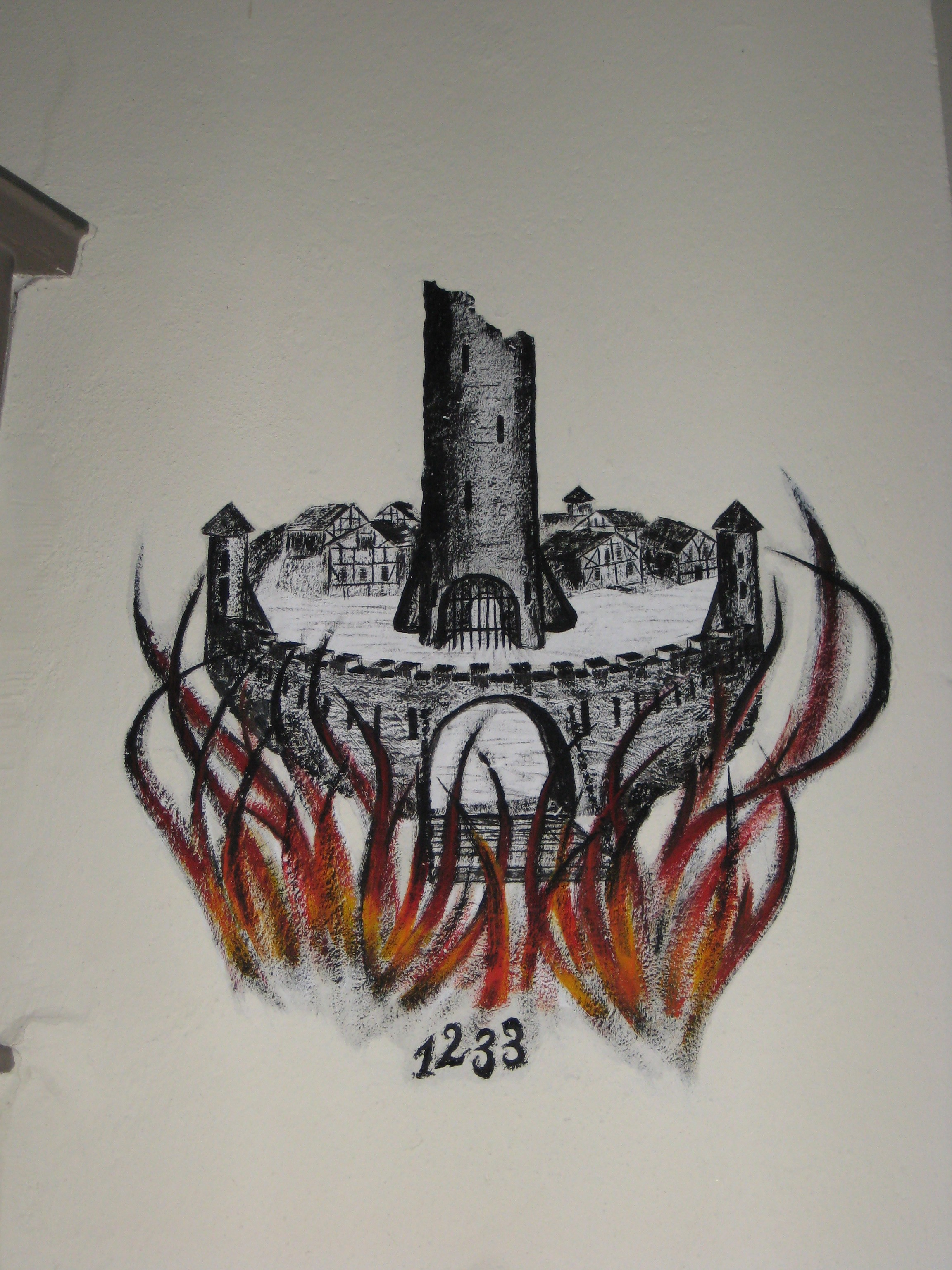 Zeichnung zum Gedenken des Wilnsdorfer Brandes 1233 in der evangelischen Kirche in Wilnsdorf.